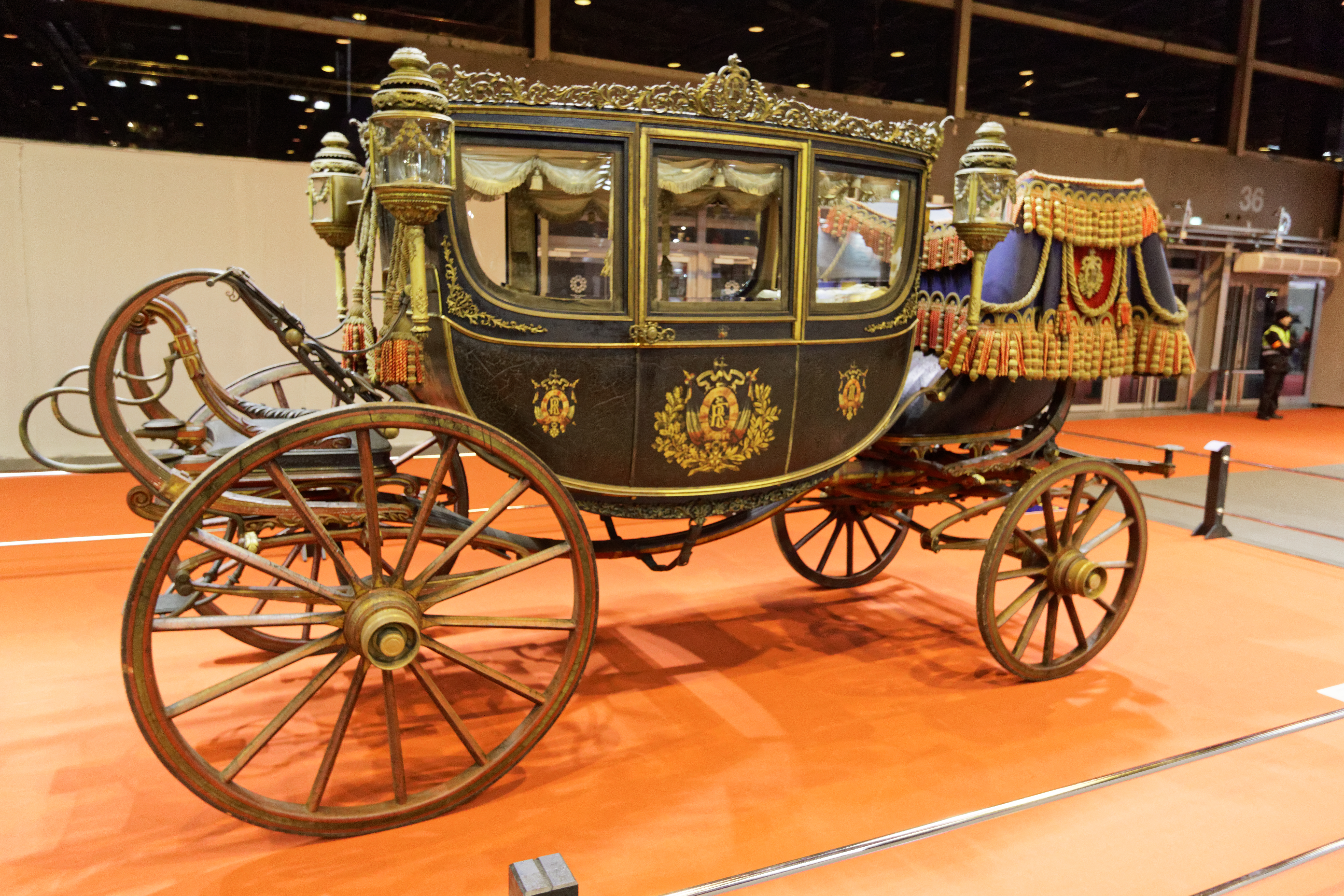 Une berline de gala de la République Française datée de 1896 et carrossée par Mühlbacher exposée lors du salon Rétromobile 2016.